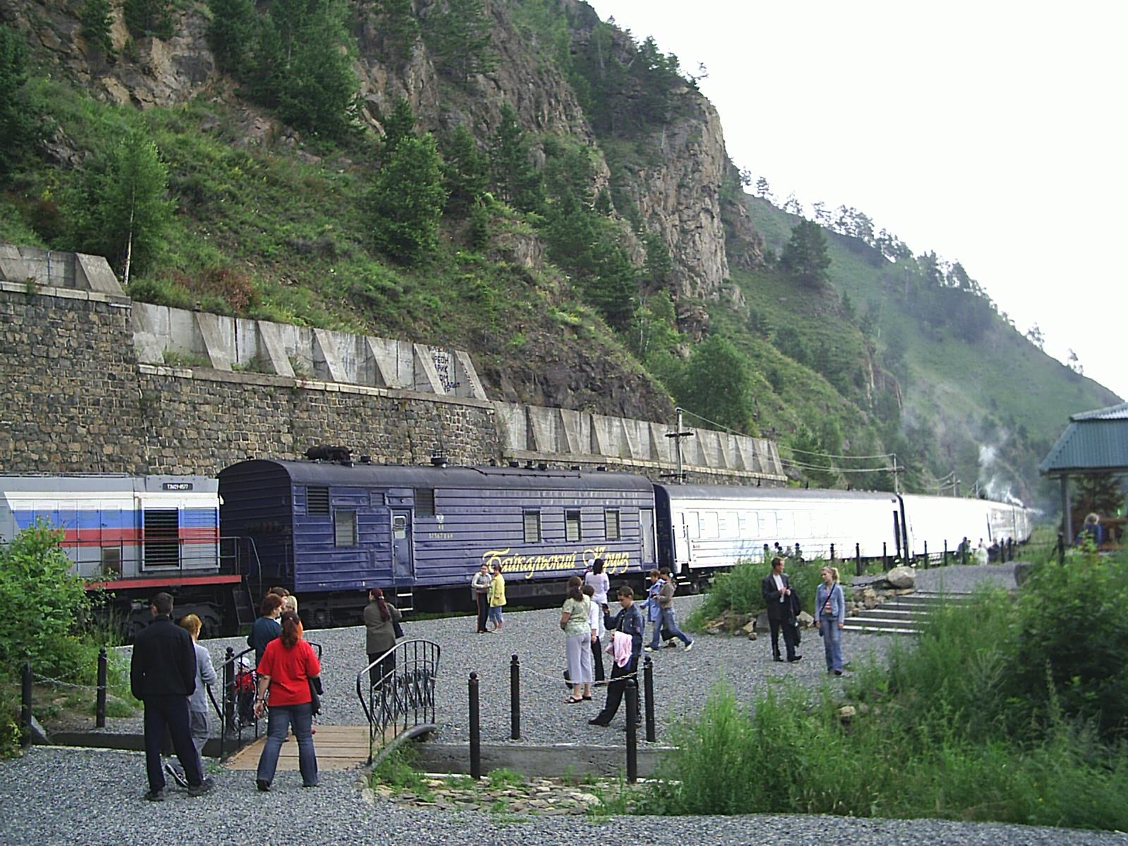 Снимок 2006 г. Киркирей. 123 км КБЖД